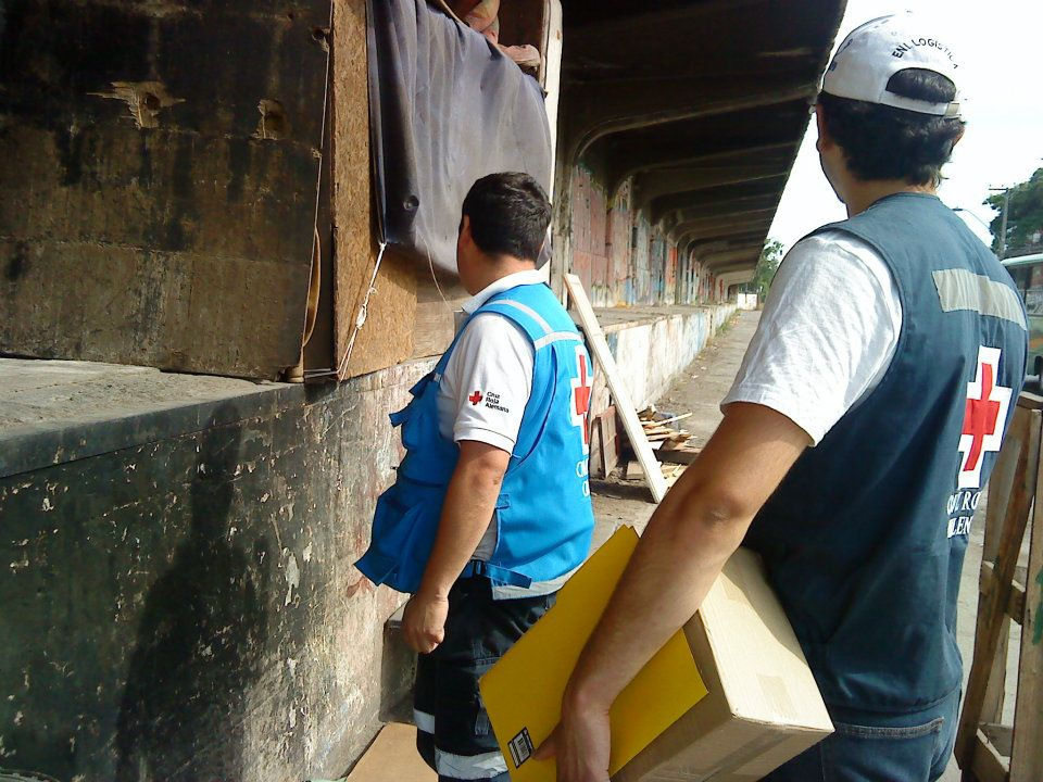 Entrega de ayuda humanitaria, por parte de voluntarios de la Cruz Roja Chilena, a habitantes en situación de indigencia.